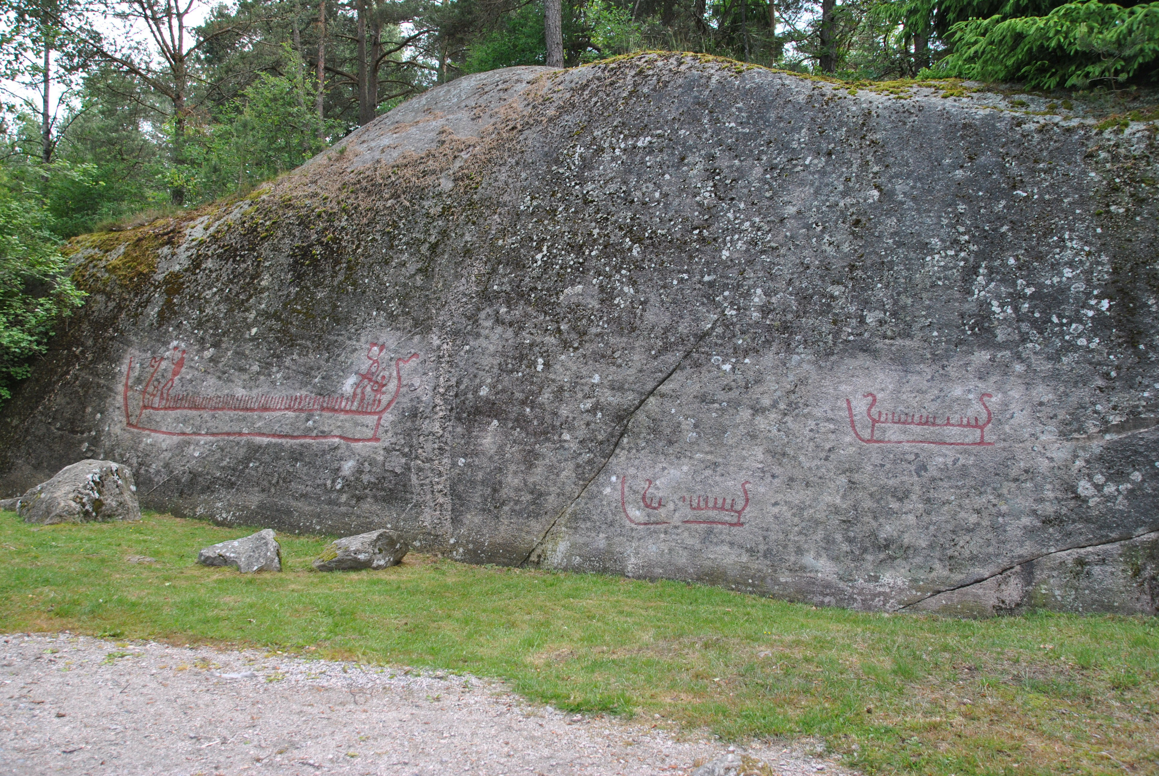 Helleristningen Bjørnstadskipet i Sarpsborg